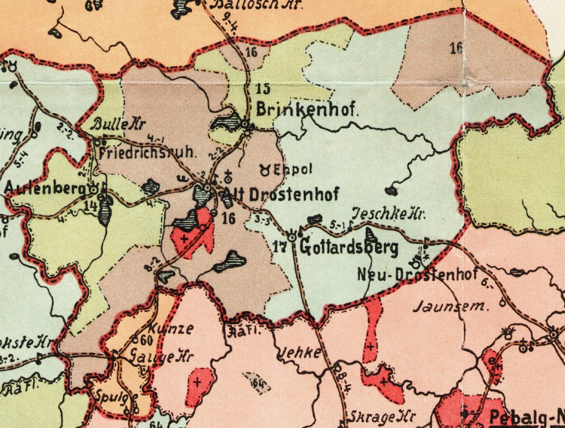 Võnnu kreisi Drusti kihelkonna mõisad 1903. aasta kaardil.